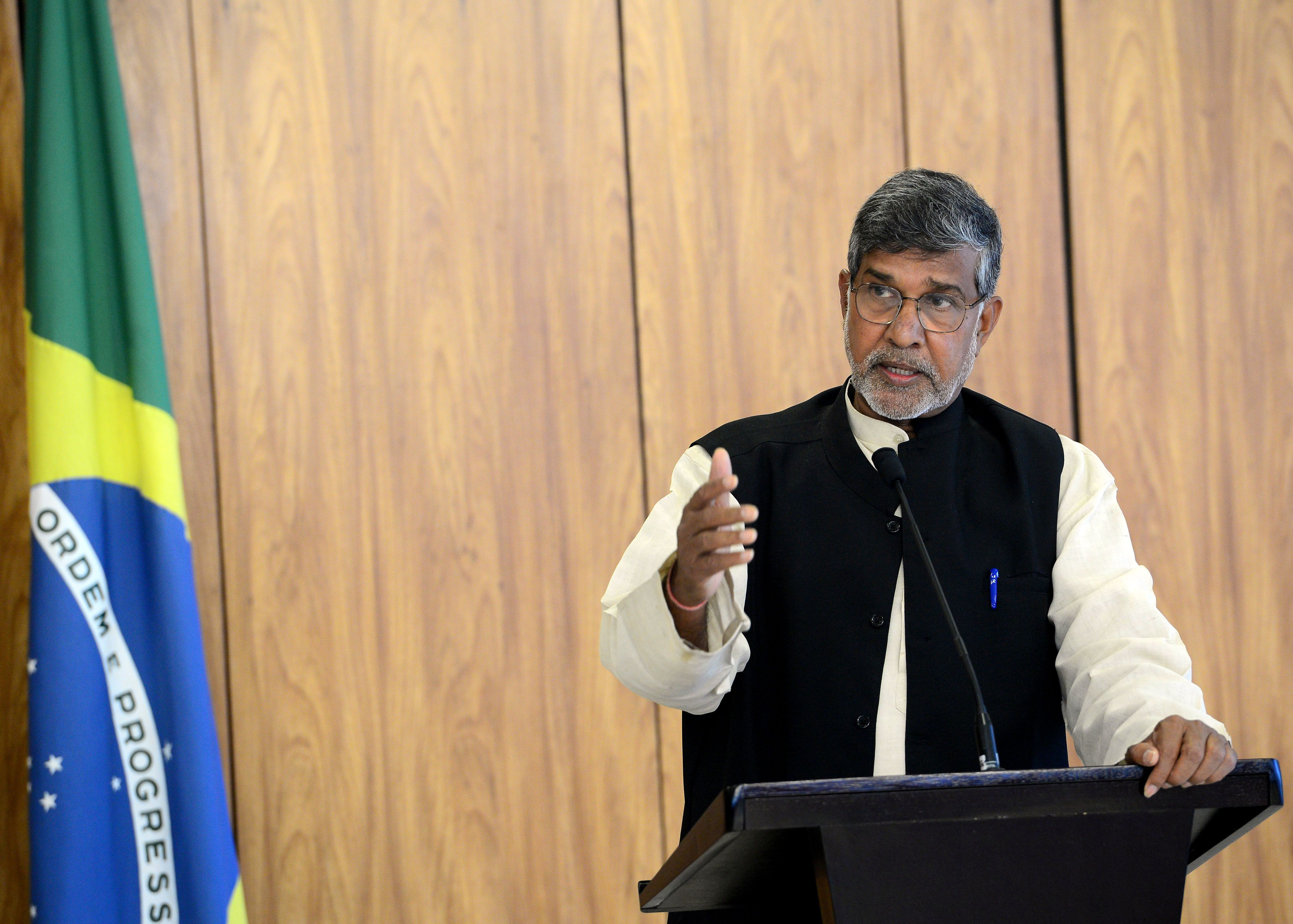 Brasília - Entrevista coletiva com o Prêmio Nobel da Paz em 2014, o indiano Kailash Satyarthi